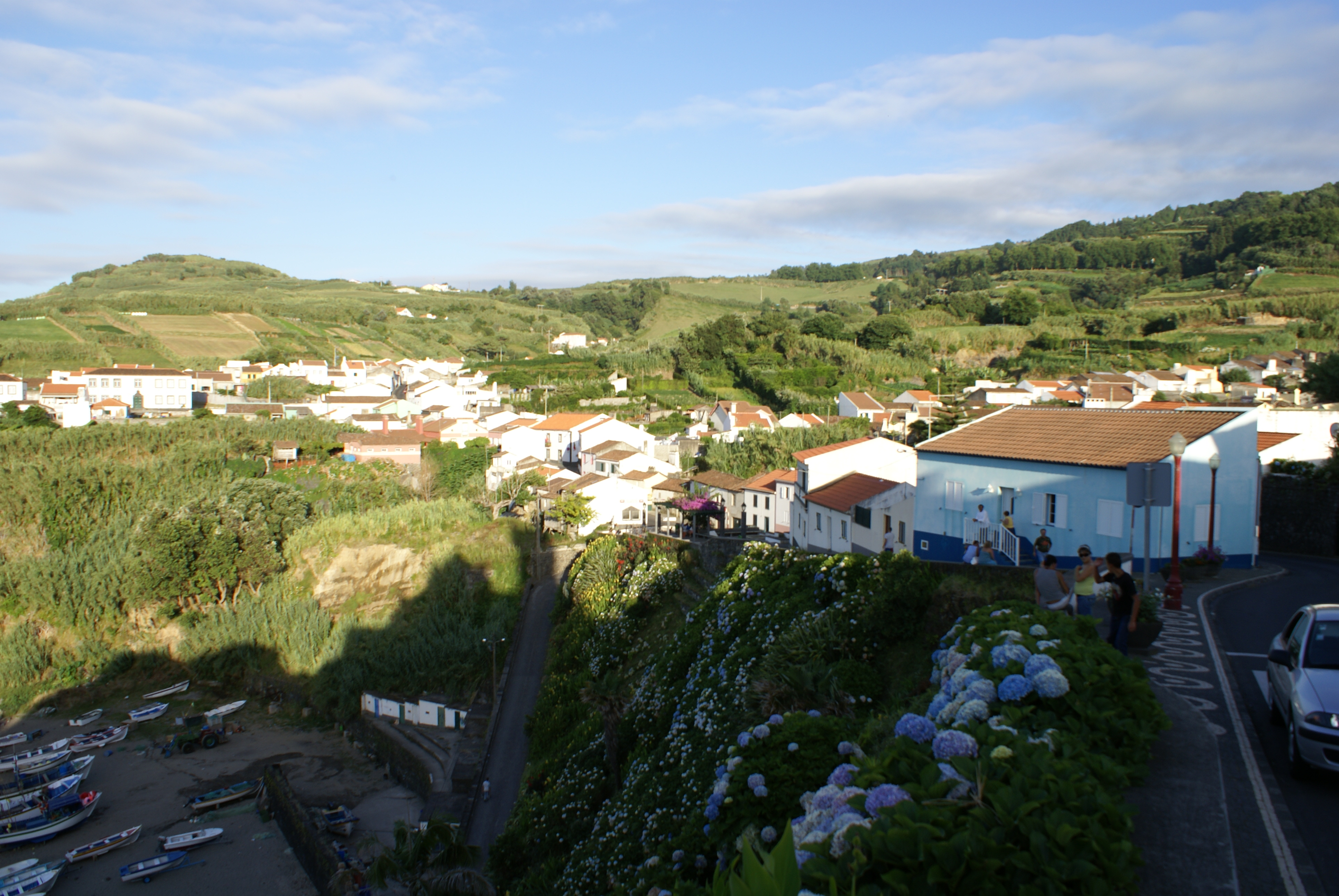 Porto Formoso, vista parcial, Ribeira Grande, ilha de São Miguel, Açores